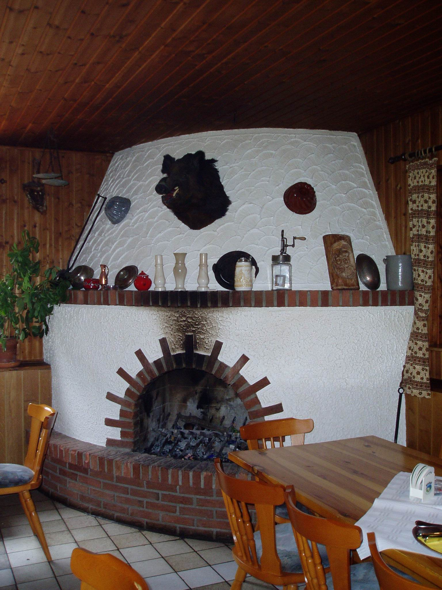 Offener Kamin in der Gaststätte Zum Saupferch